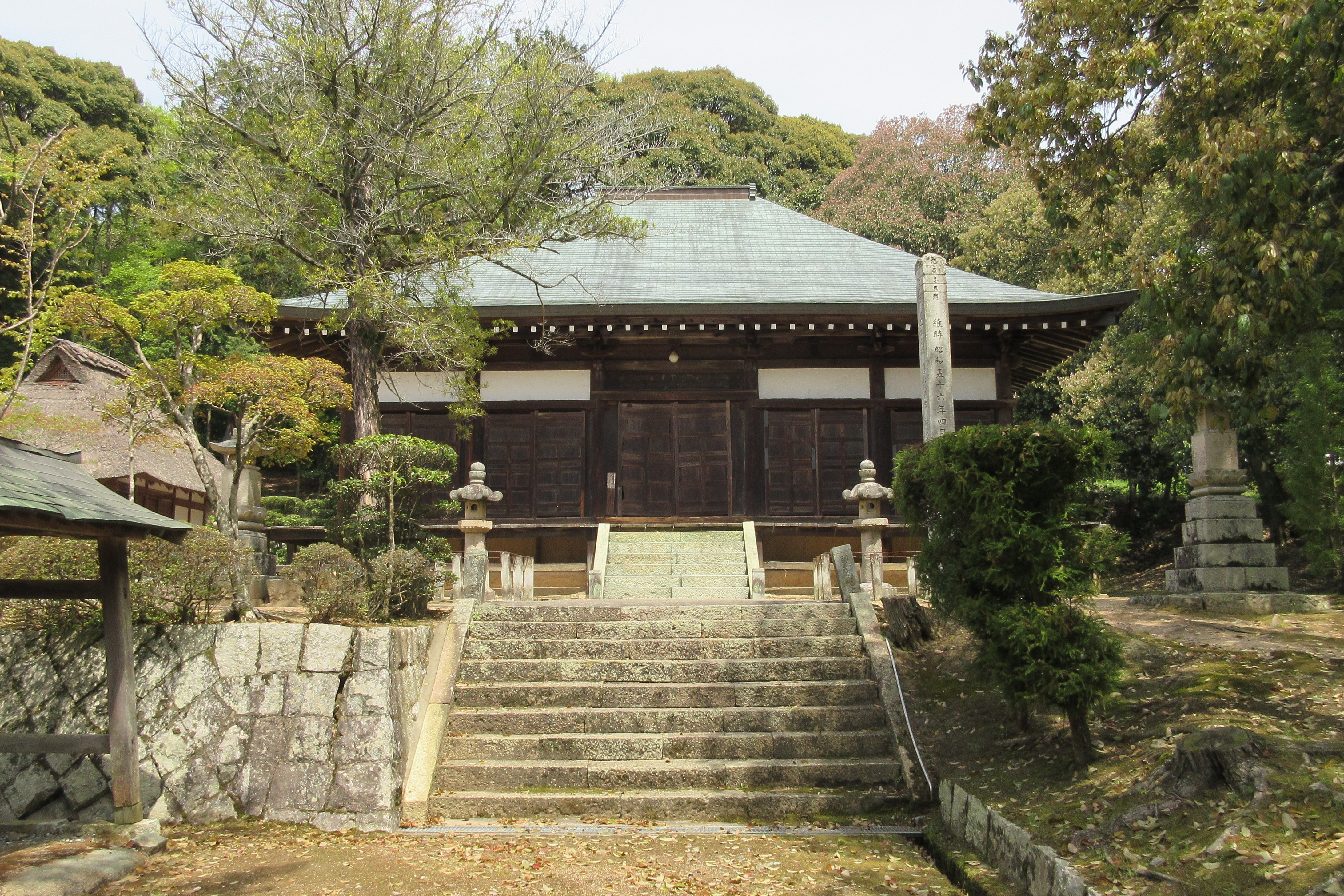 性海寺本堂